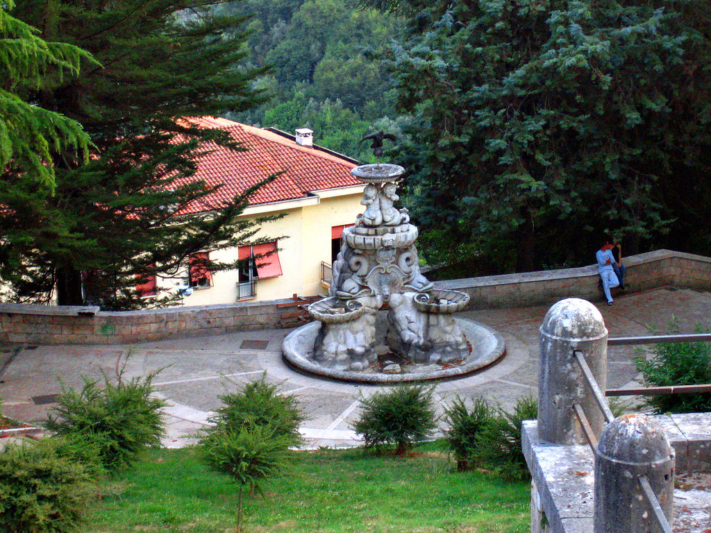 Anagni, Lazio, Italia